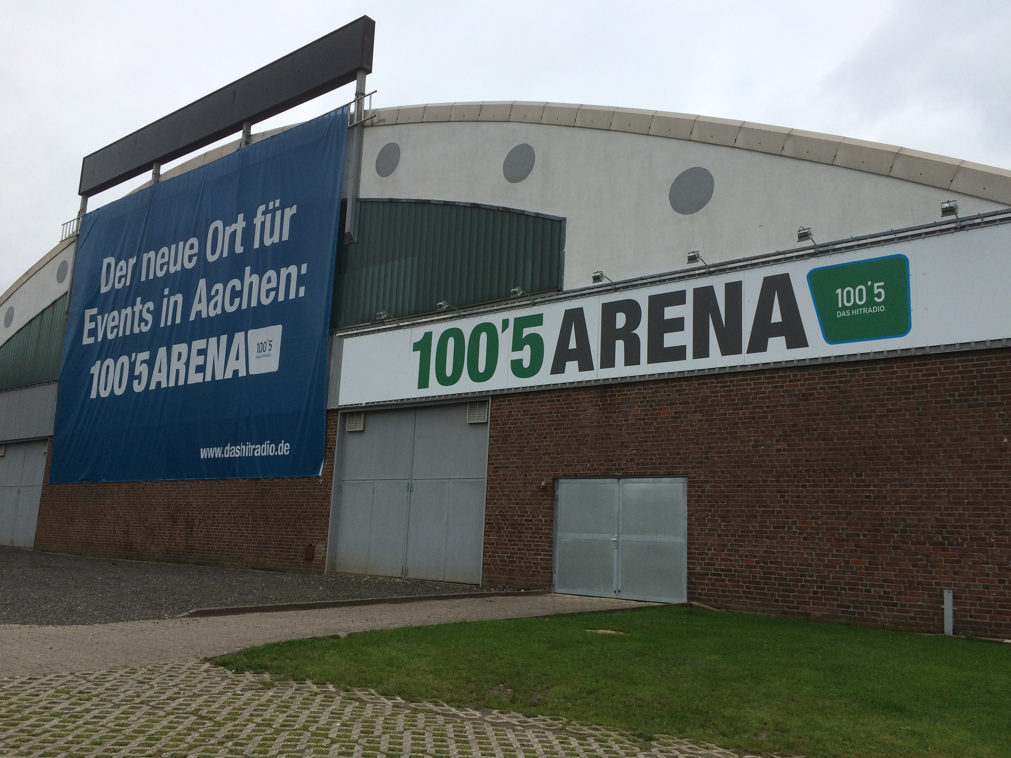 Die 100´5 ARENA